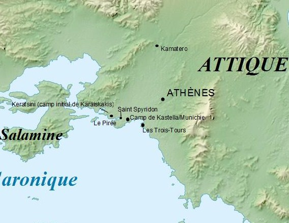 Carte de l'Attique montrant les lieux concernés par la Bataille de Phalère à partir de la carte de Sting : File:Saronic Gulf map-fr.svg